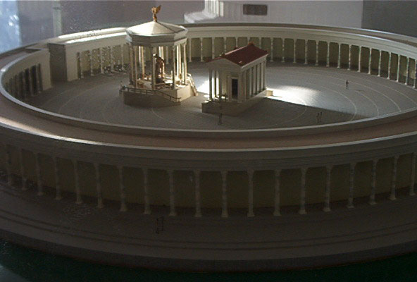 Maquette du port de Carthage à l'époque romaine